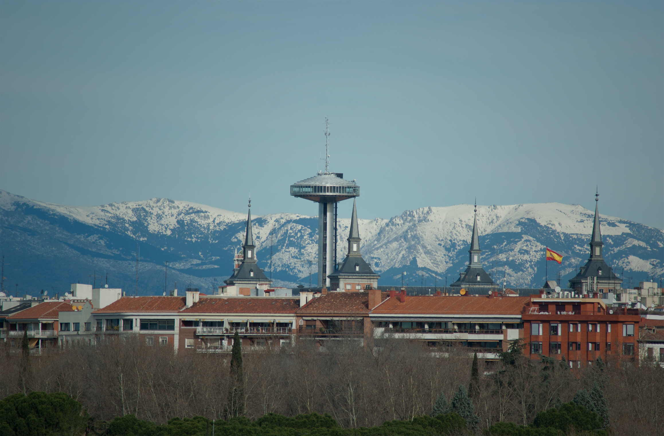 Faro de Moncloa, Madrid